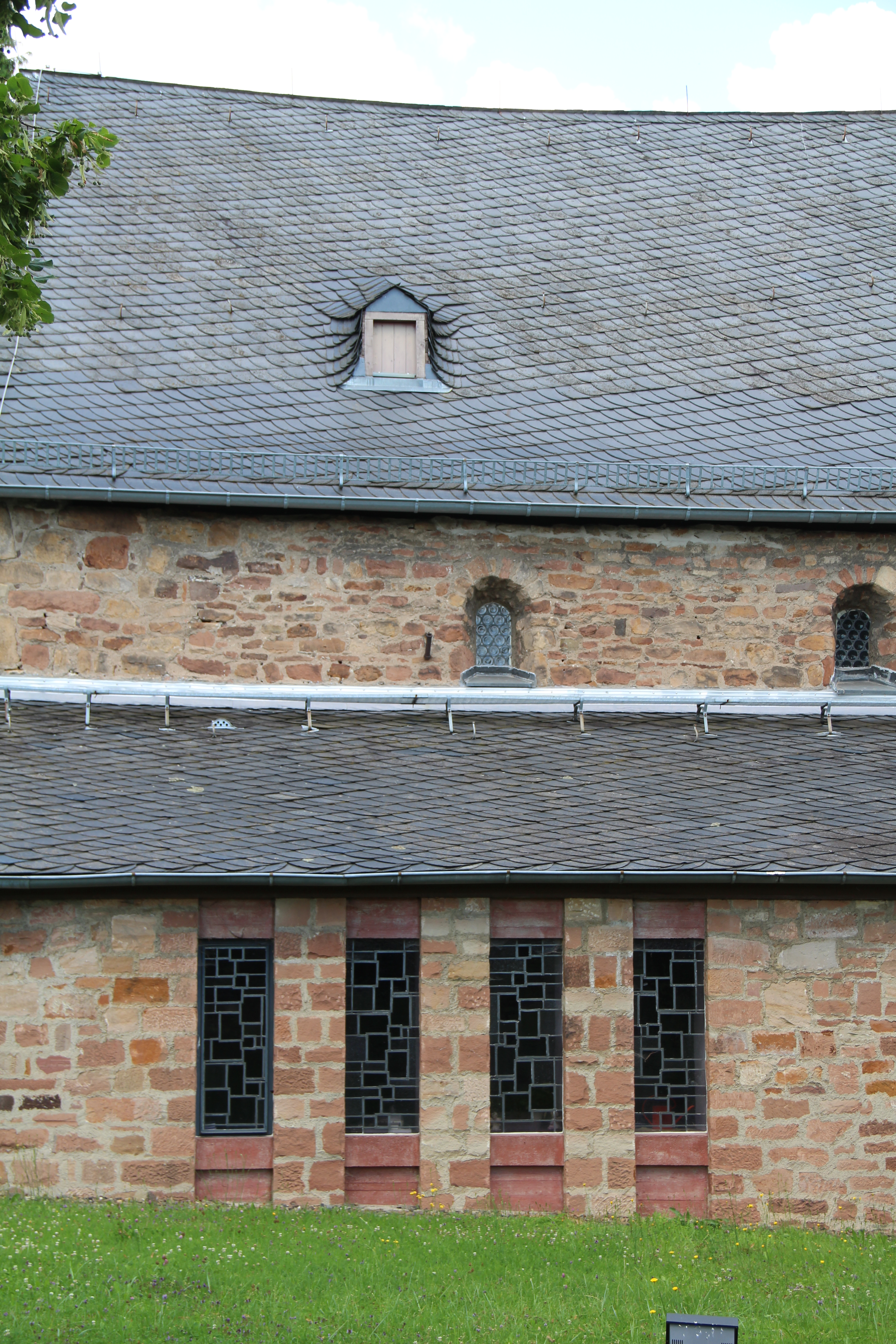 Kirche